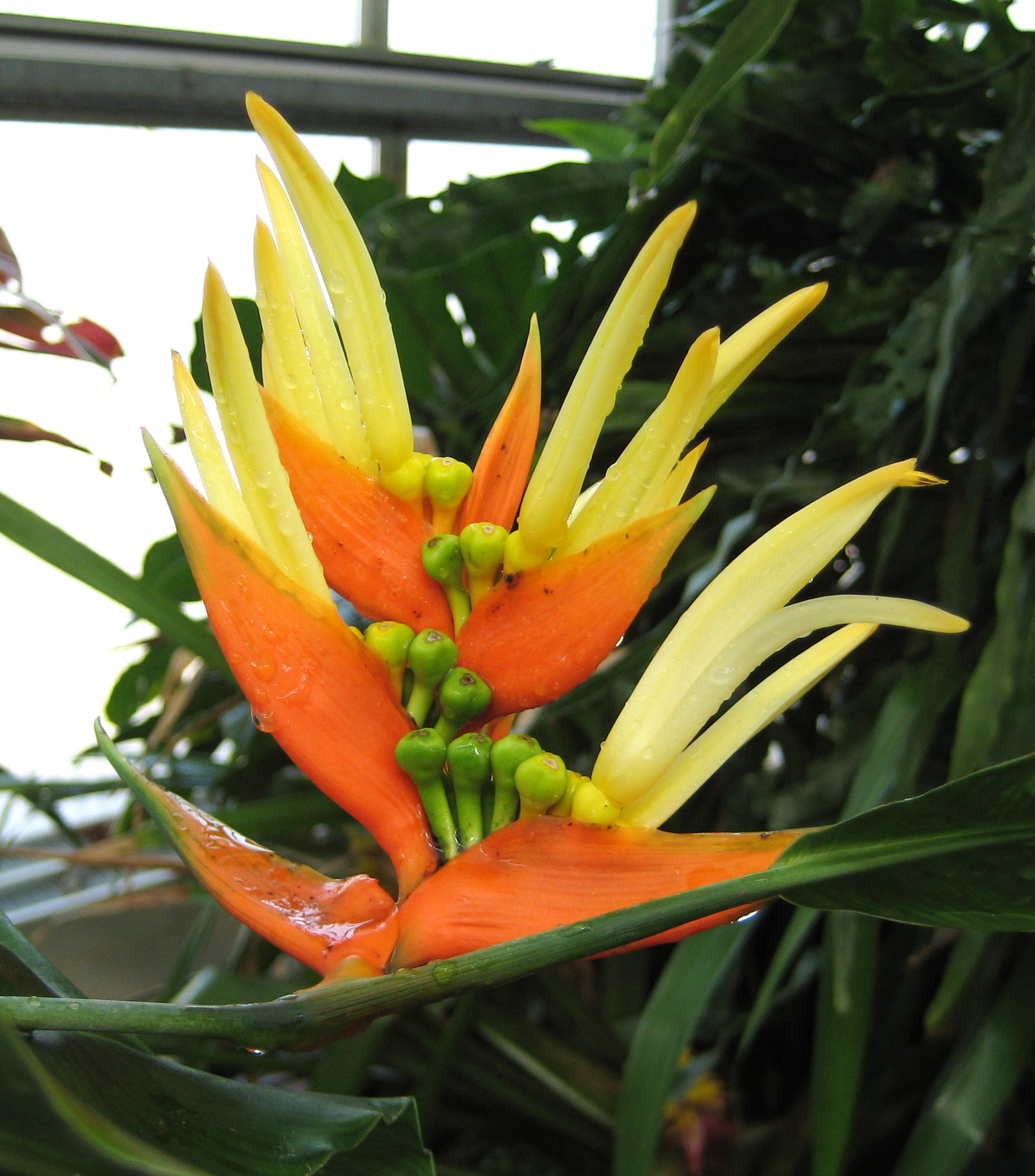 Heliconia aurantiaca im Botanischen Garten Dresden